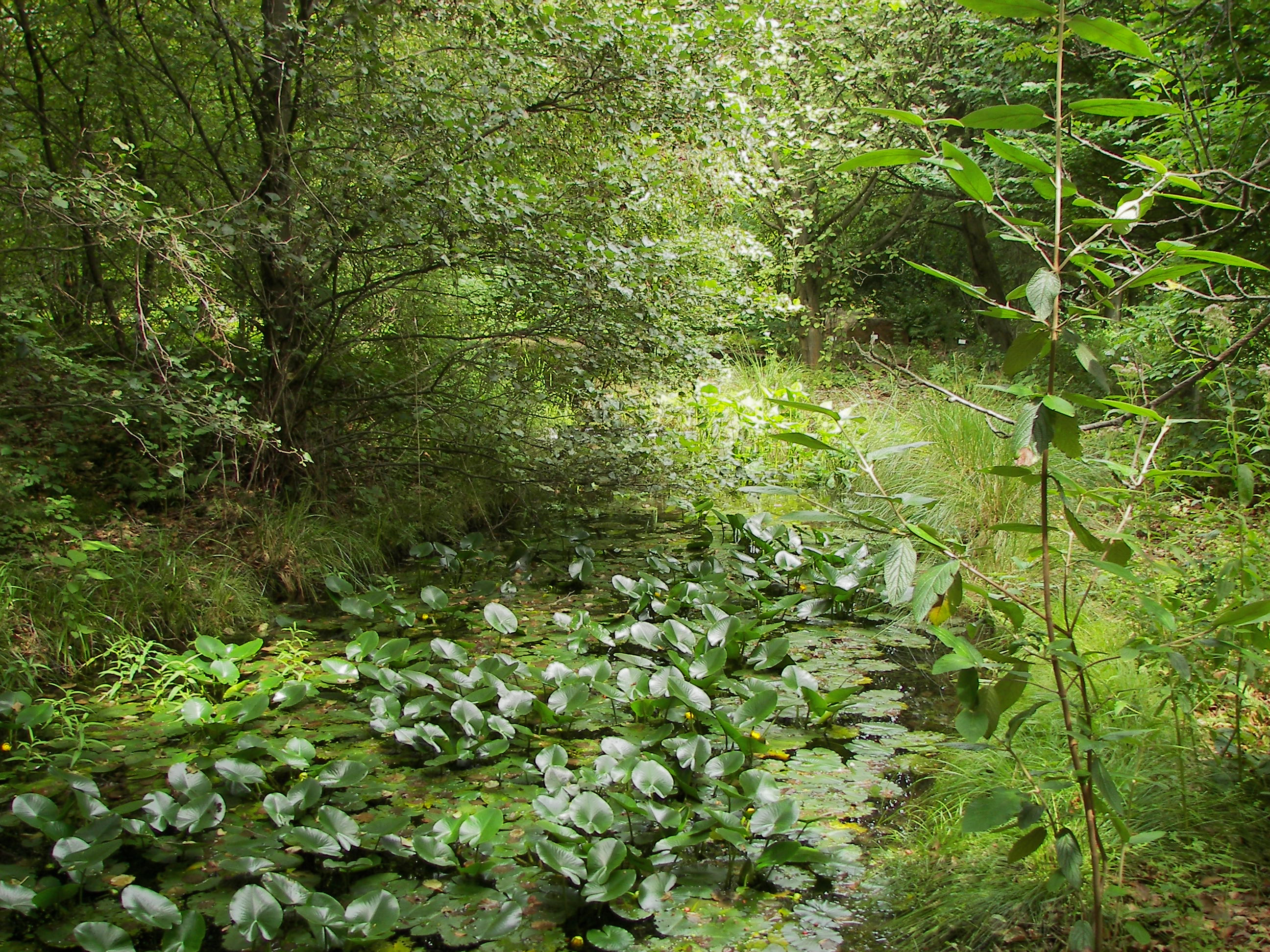 Gelbe Teichrose (Nuphar lutea) im Neuen Botanischen Garten Marburg